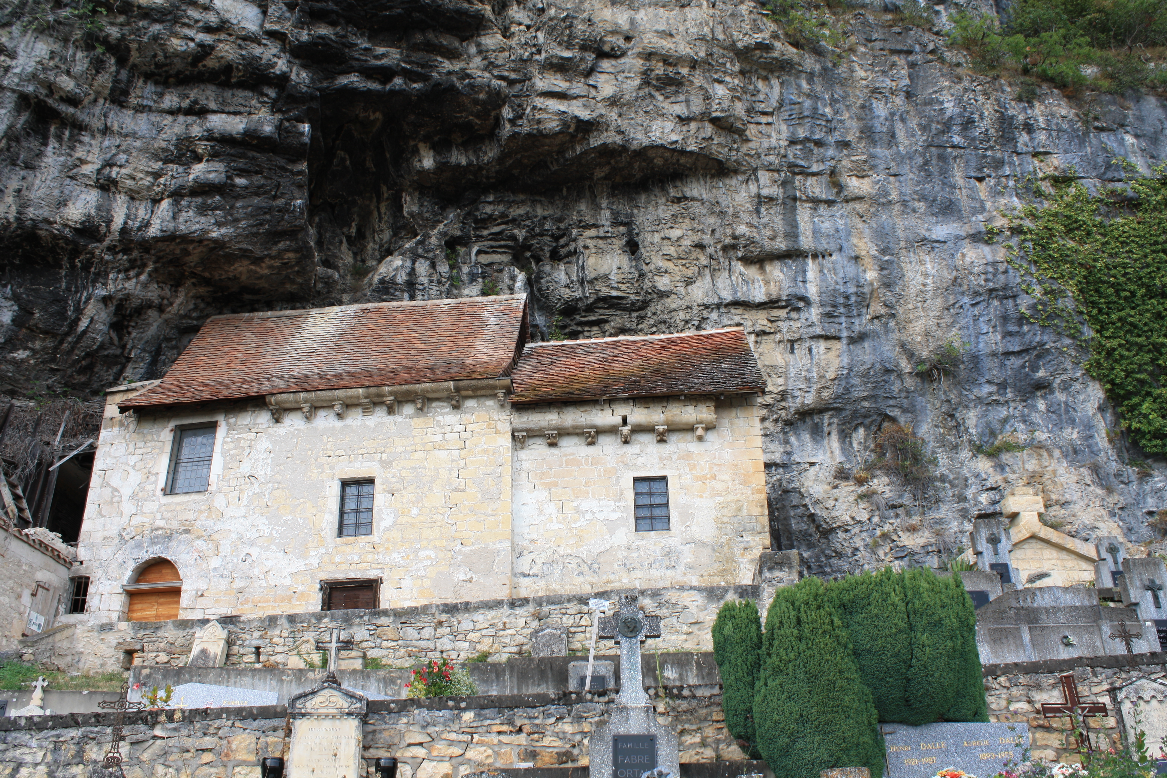 Maison, (Classé, 1938) .